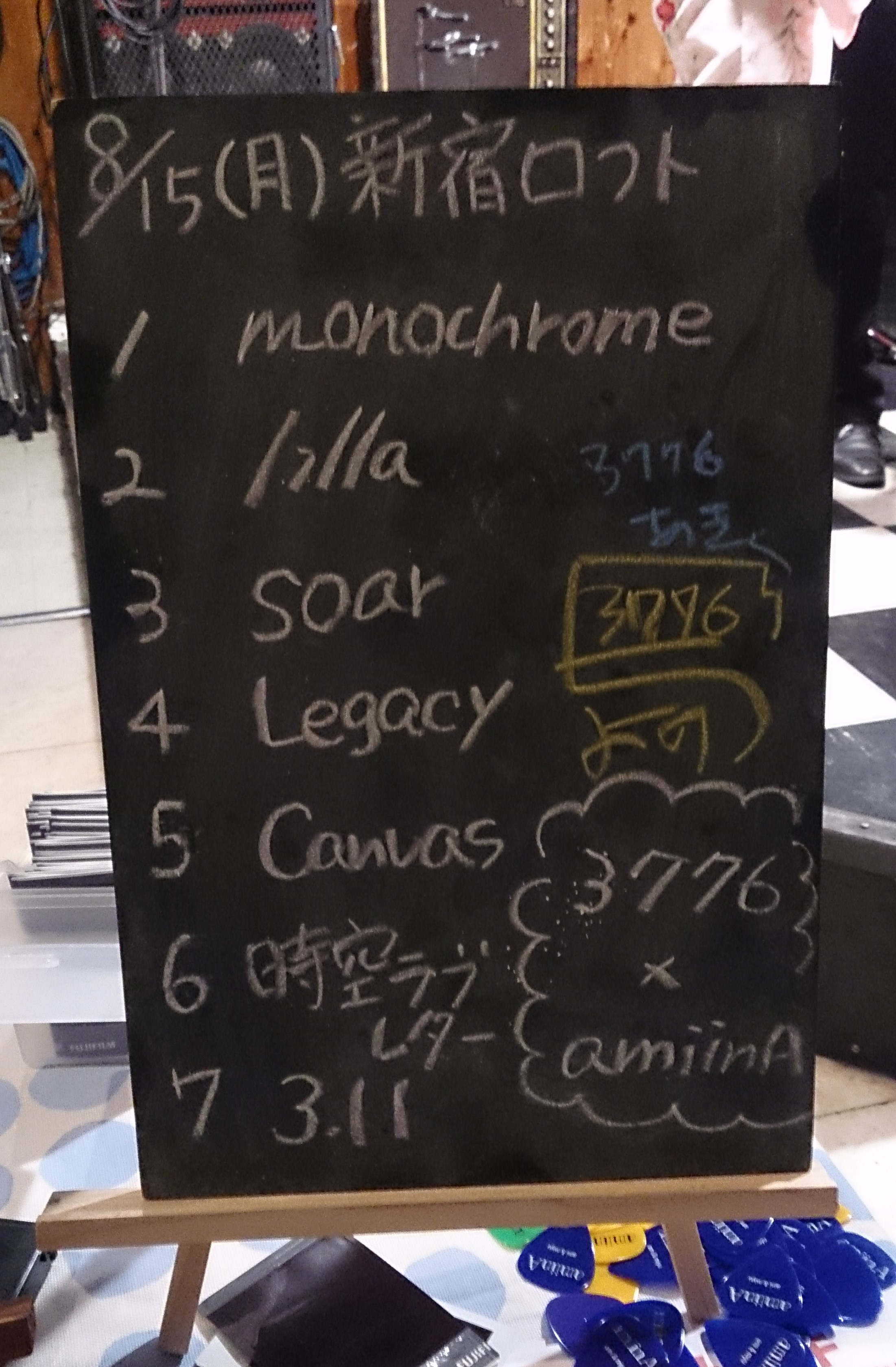 amiinAセトリボード(20160815(1))